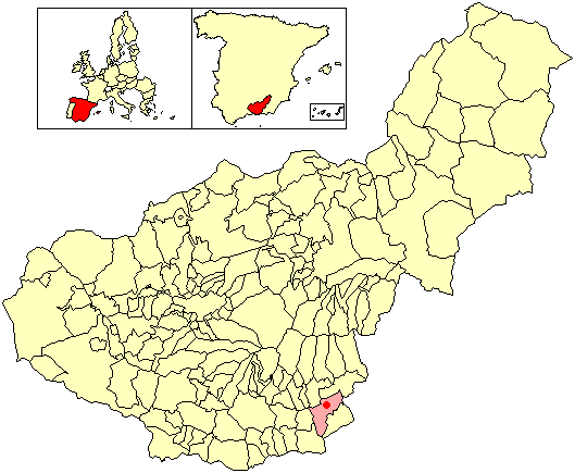 Situación de la localidad de Mecina Tedel (en el municipio de Murtas) respecto a la provincia de Granada, en España.